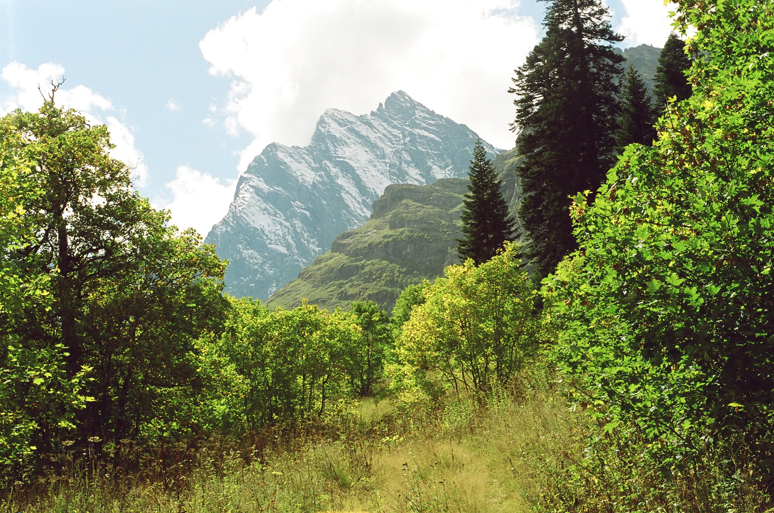 Гоначхирское ущелье. Тебердинский заповедник